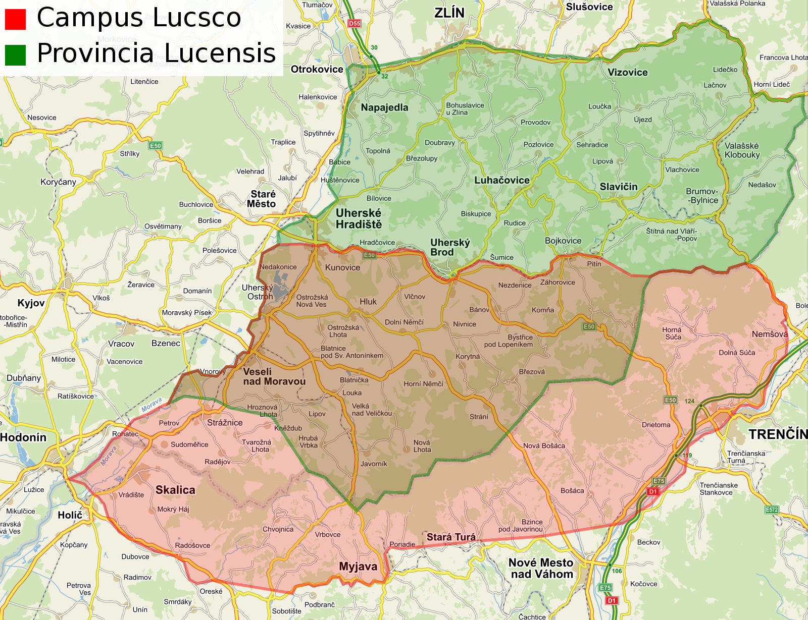 Přibližní znázornění pravděpodobných hranic Luckého pole (Campus Lucsco) a pozdější Lucké provincie (Provincia Lucensis) na mapě východní Moravy a přilehlého slovenského pohraničí dle údajů z příspěvku Jiřího Mitáčka „Campus Lucsco“ – proměny jedné otázky do monografie Galuška, Luděk et al.: Východní Morava v 10. až 14. století. Brno : Moravské zemské muzeum et al., 2008.